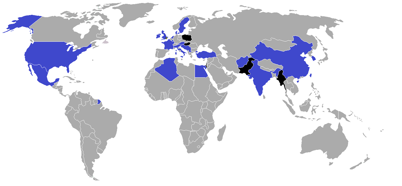 Carte des pays ayant participé à l'épreuve de football aux jeux olympiques d'été de 1948.